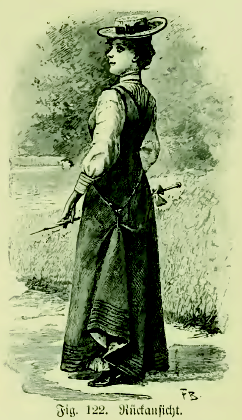 Fig. 122. Rückansicht Reformkleid. Nach dem "Naturarzt".